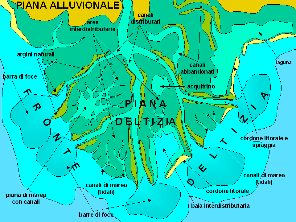 Schema concettuale, in pianta, di un delta fluviale. Conceptual scheme (map) of a deltaic depositional system. Text in italian.